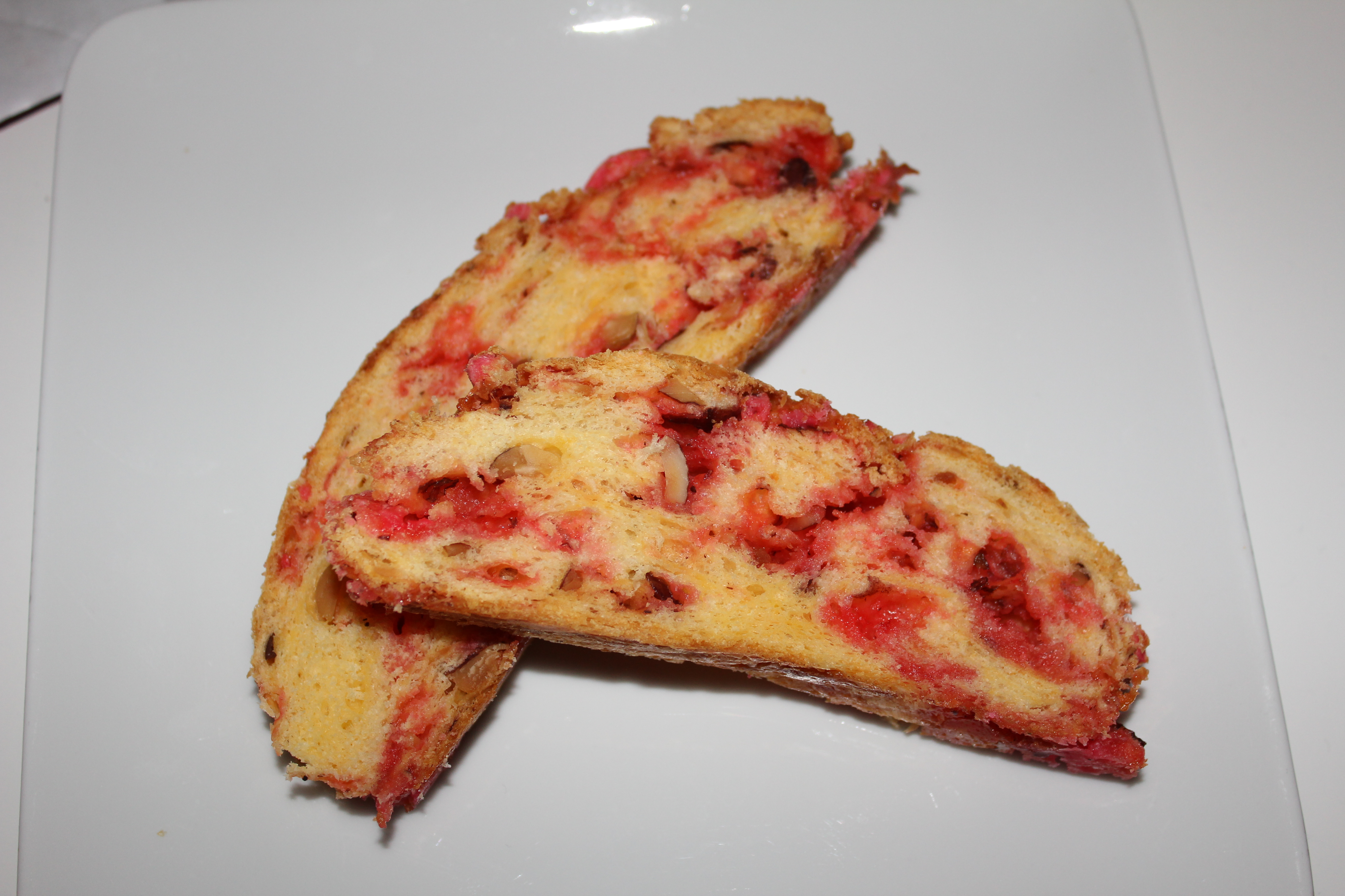 Praluline tranchée